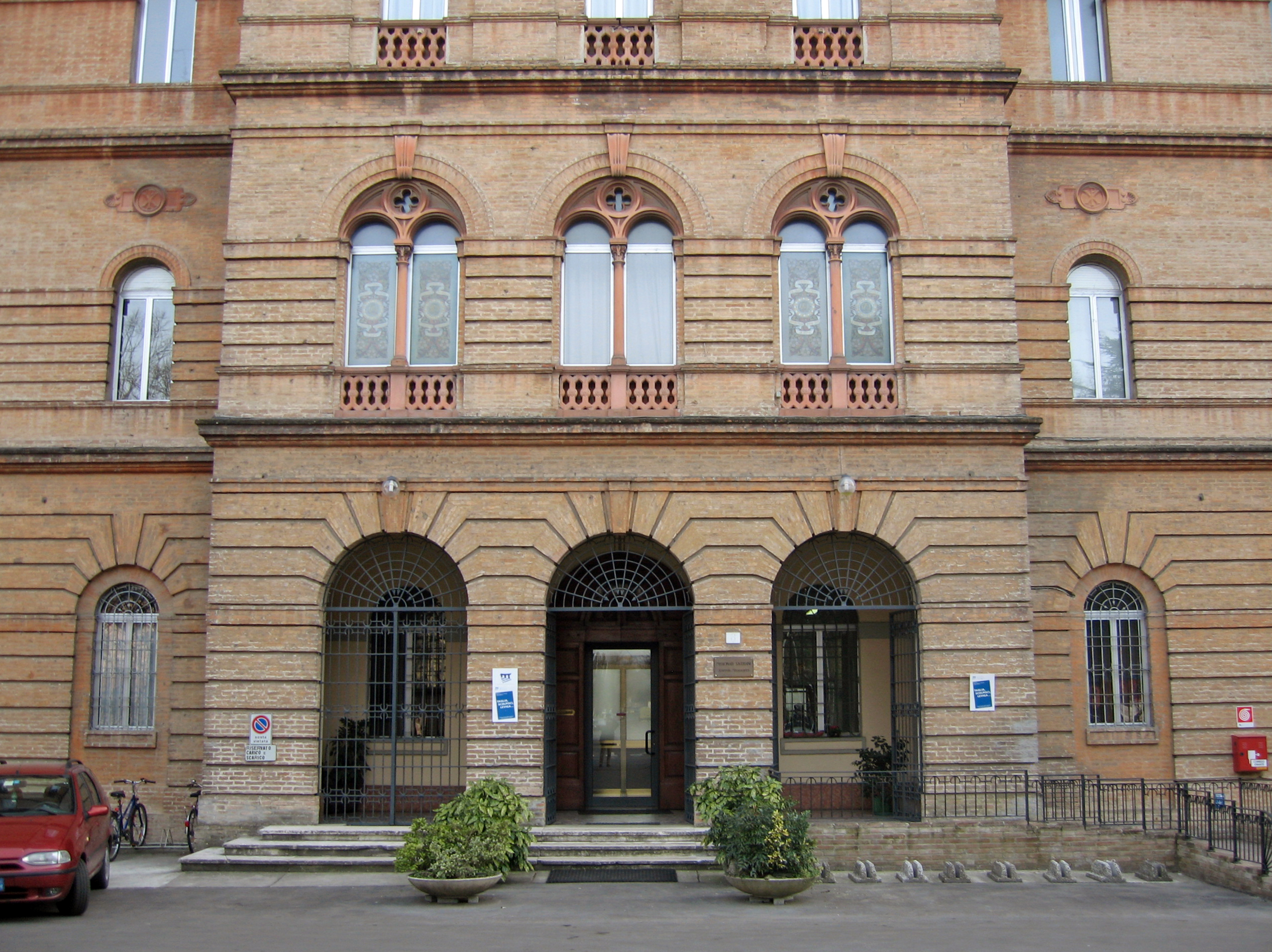 Casa Madre dei Missionari Saveriani - ingresso